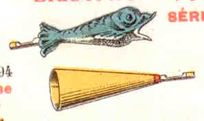 Bigotphones en vente à Paris 120 rue de Charonne et 175 boulevard Voltaire chez Veuve Lecour et Brouchot.